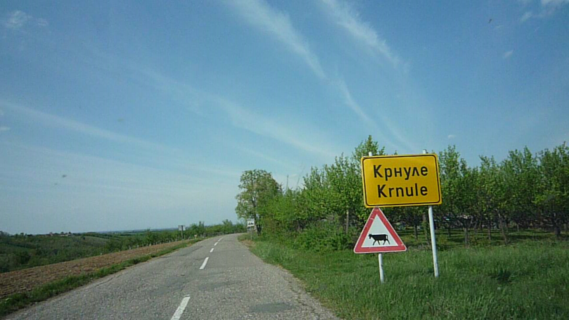 Slikano na ulazu u selo.